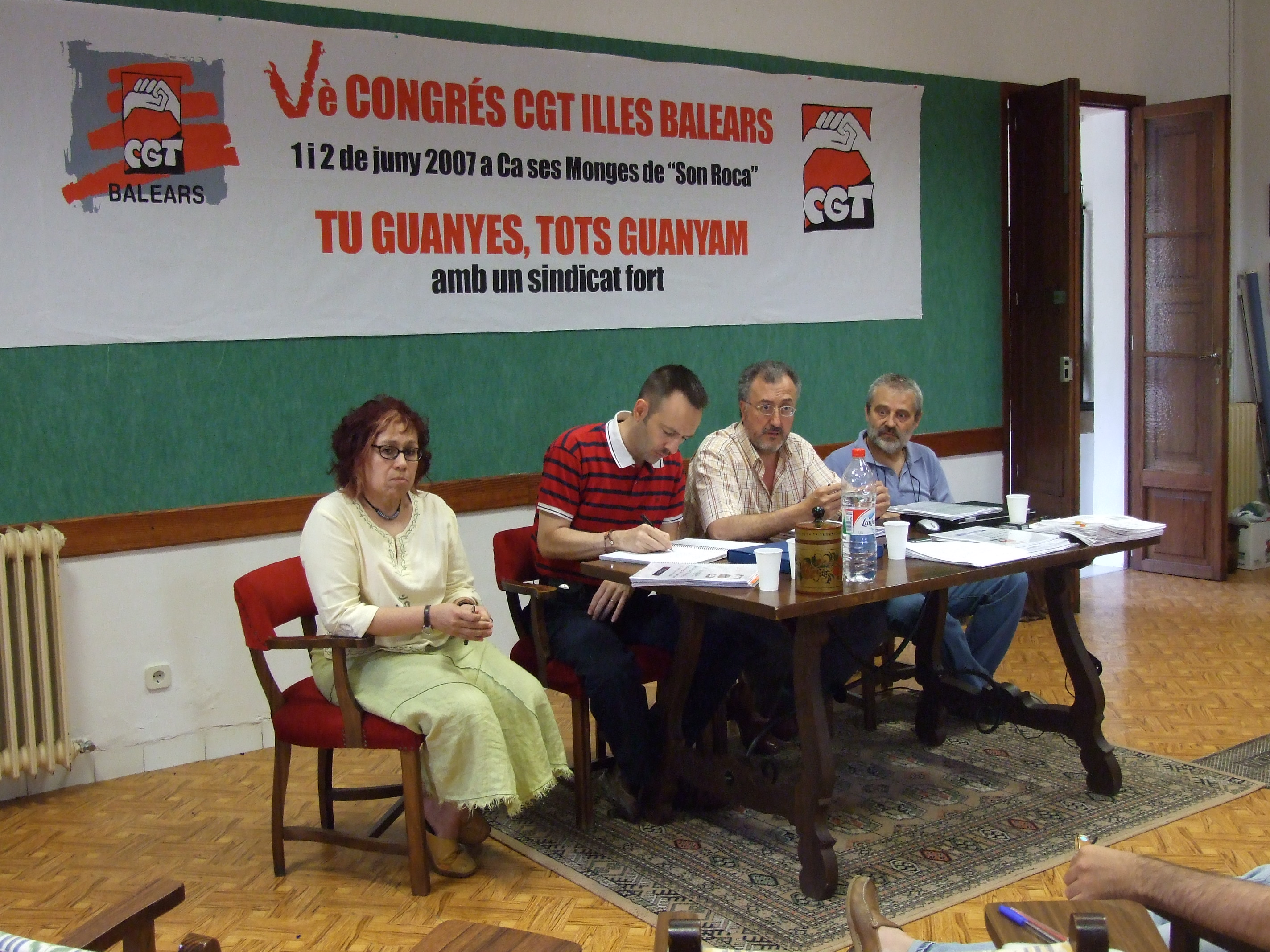 Congrés de juny de 2007 de la CGT-Illes Balears